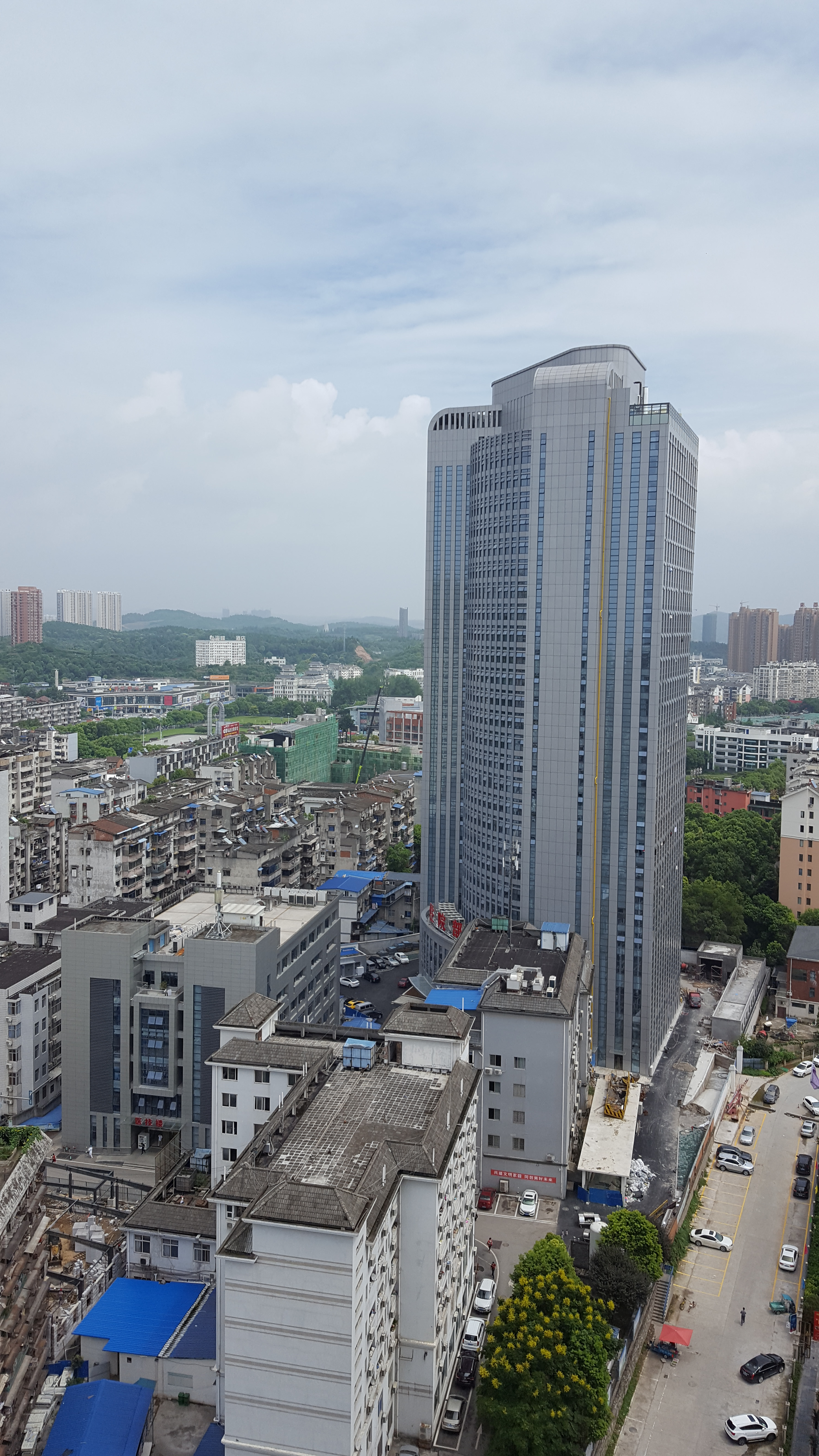 中文（中国大陆）: 三峡大学附属仁和医院住院部